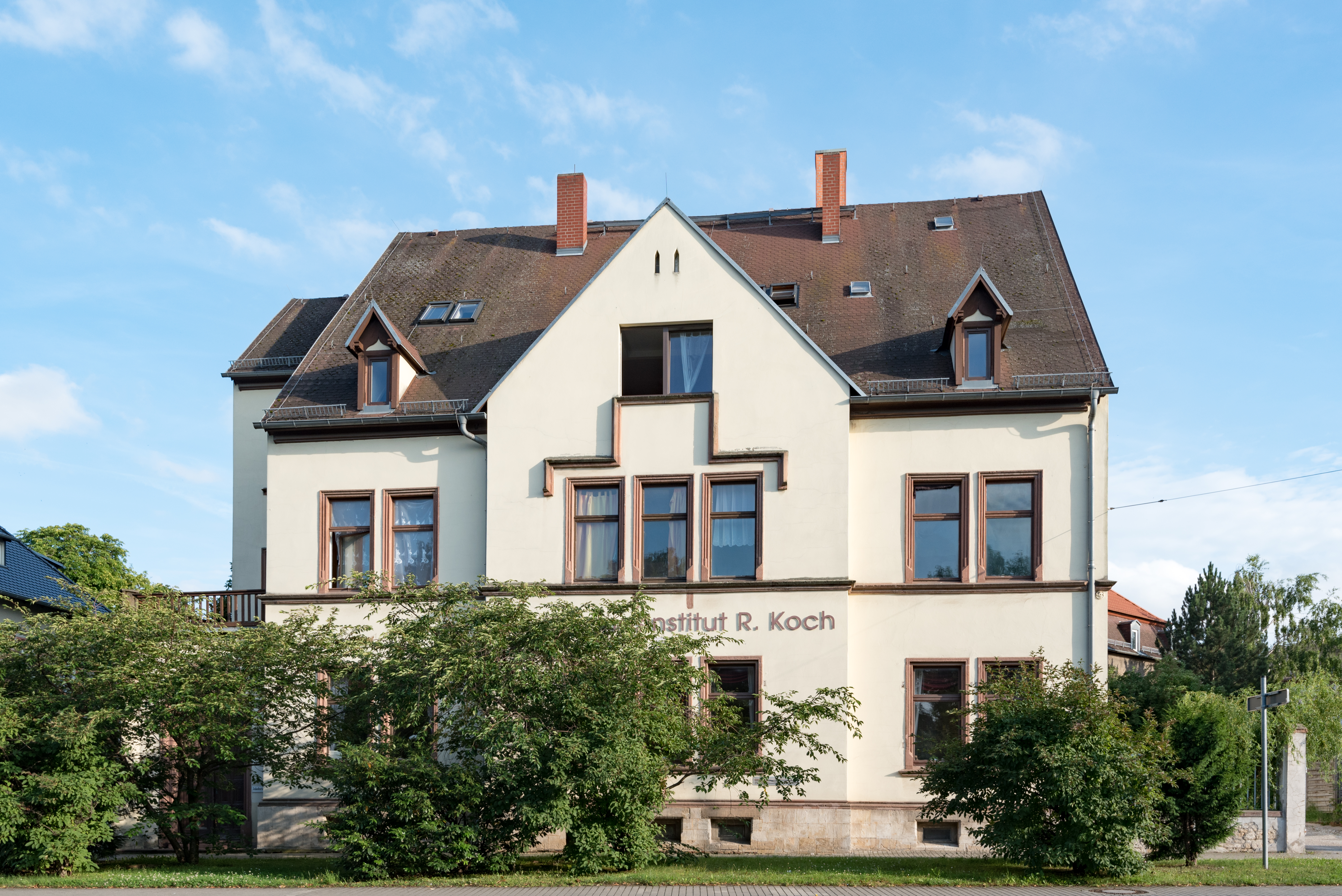 Naumburg (Saale), Jakobsring 2